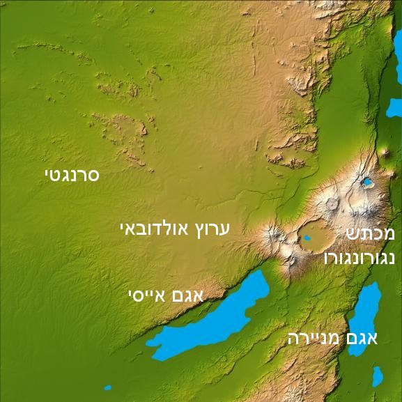 אולדובאי